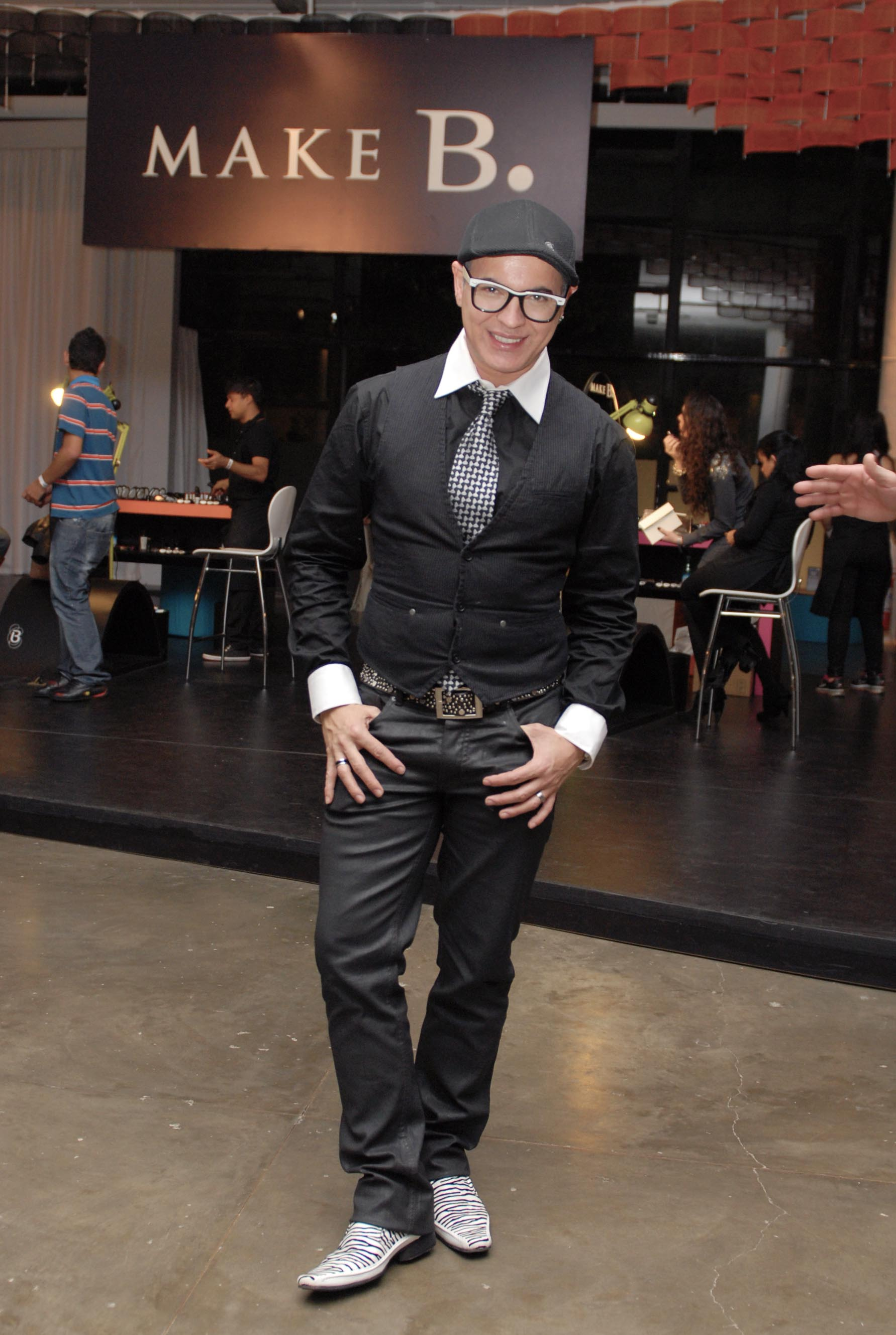 Foto: Marcos Madi